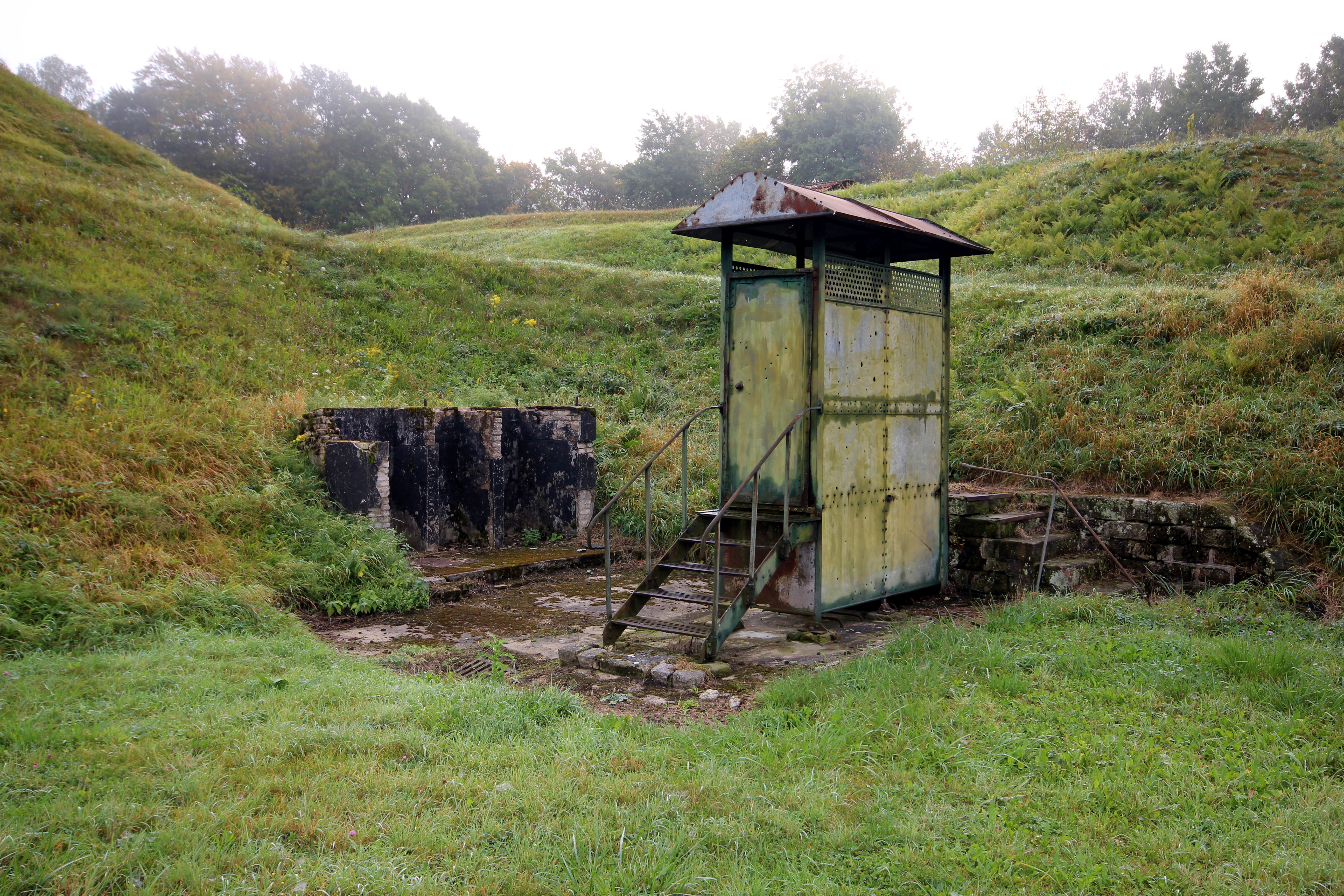 Les édicules goux dans la cour du fort de Bois l'Abbé